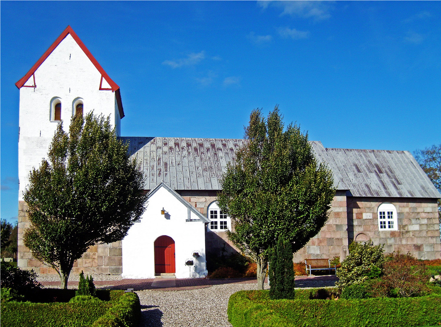 fra syd